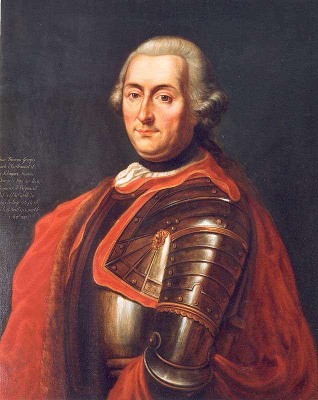 Comte Jean-François d'Oultremont, 1676-1737, époux d'Isabelle de Bavière, comtesse de Warfusée.